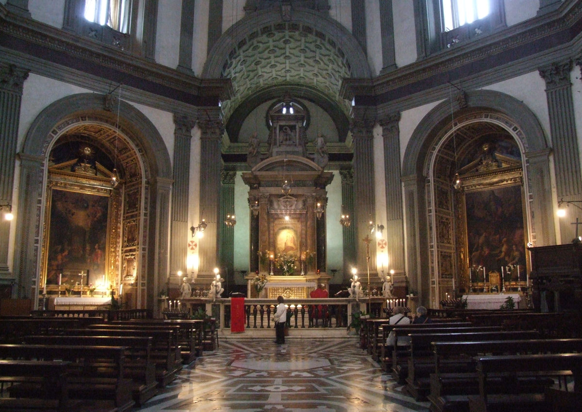 Chiesa Madonna del Umilta, Pistoia, Italy